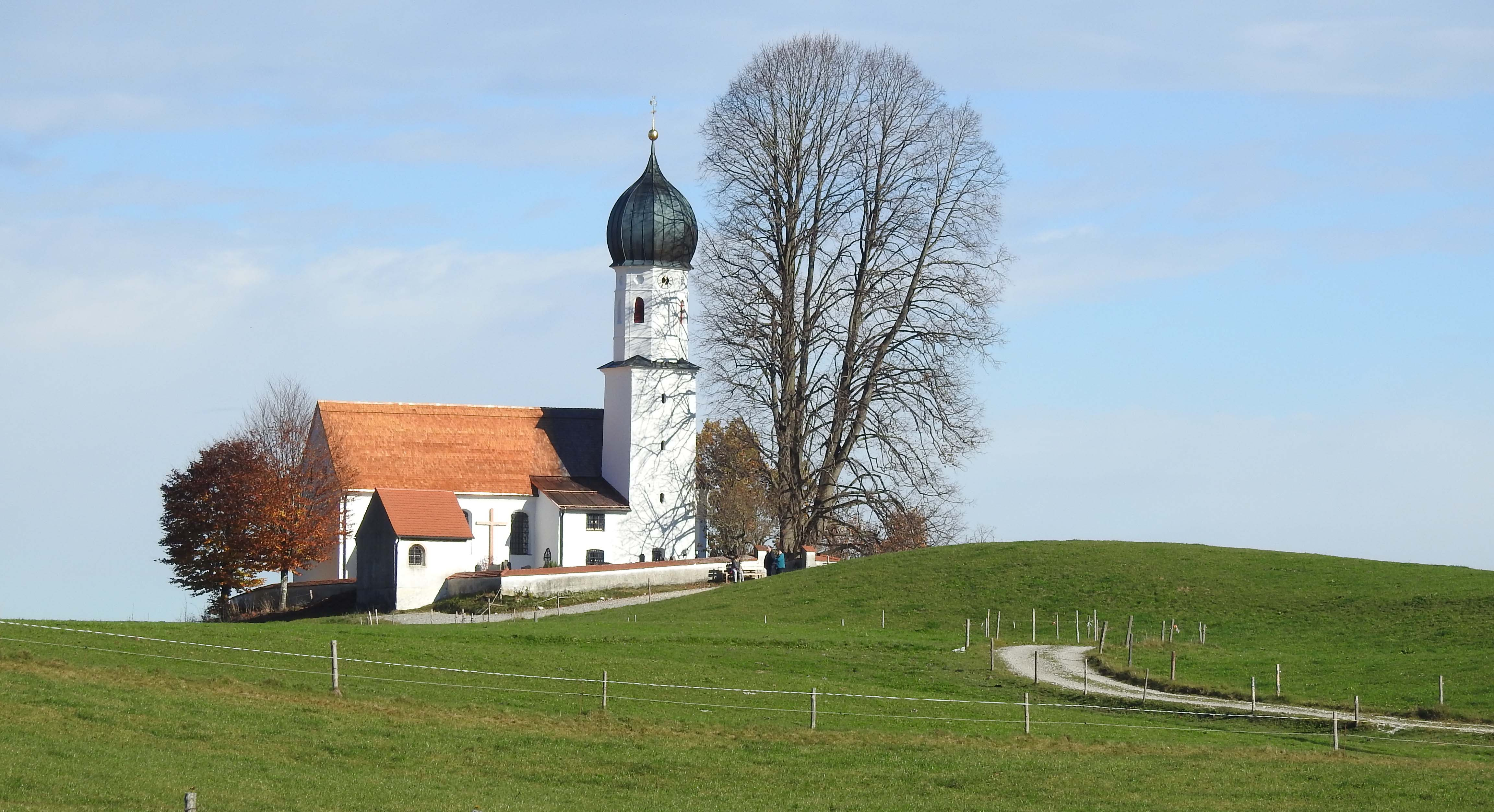 Kirche Maria Heimsuchung bei Oberbuchen, Bad Heilbrunn